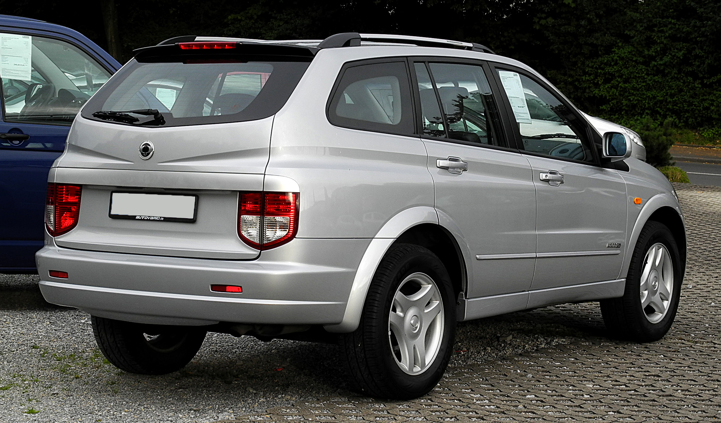 SsangYong Kyron M200XDi